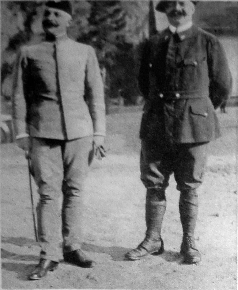 Le Miroir N° 90 page 16 photo de Messimy.